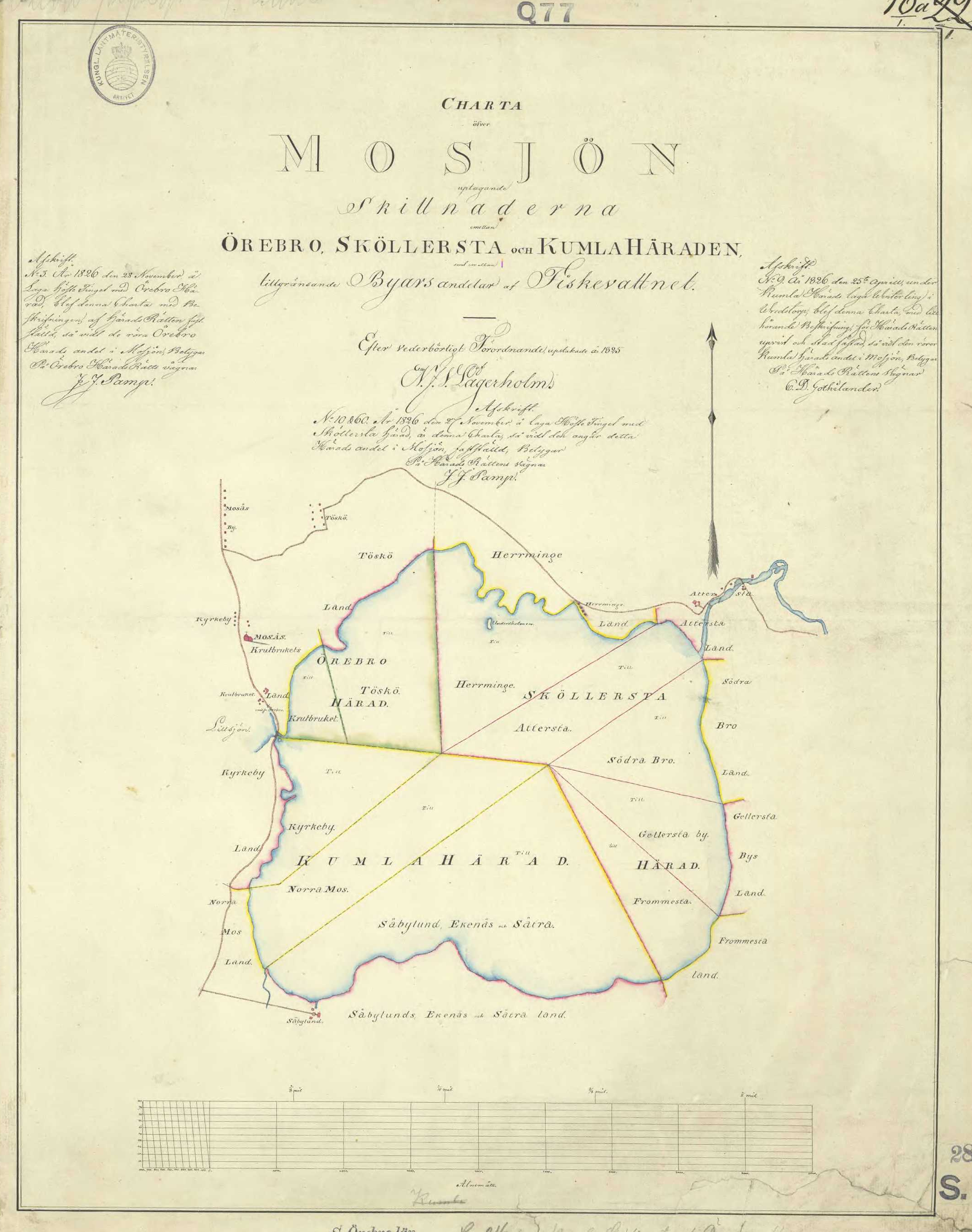 Äldre karta över den numer torrlagda sjön Mosjön söder om Örebro.